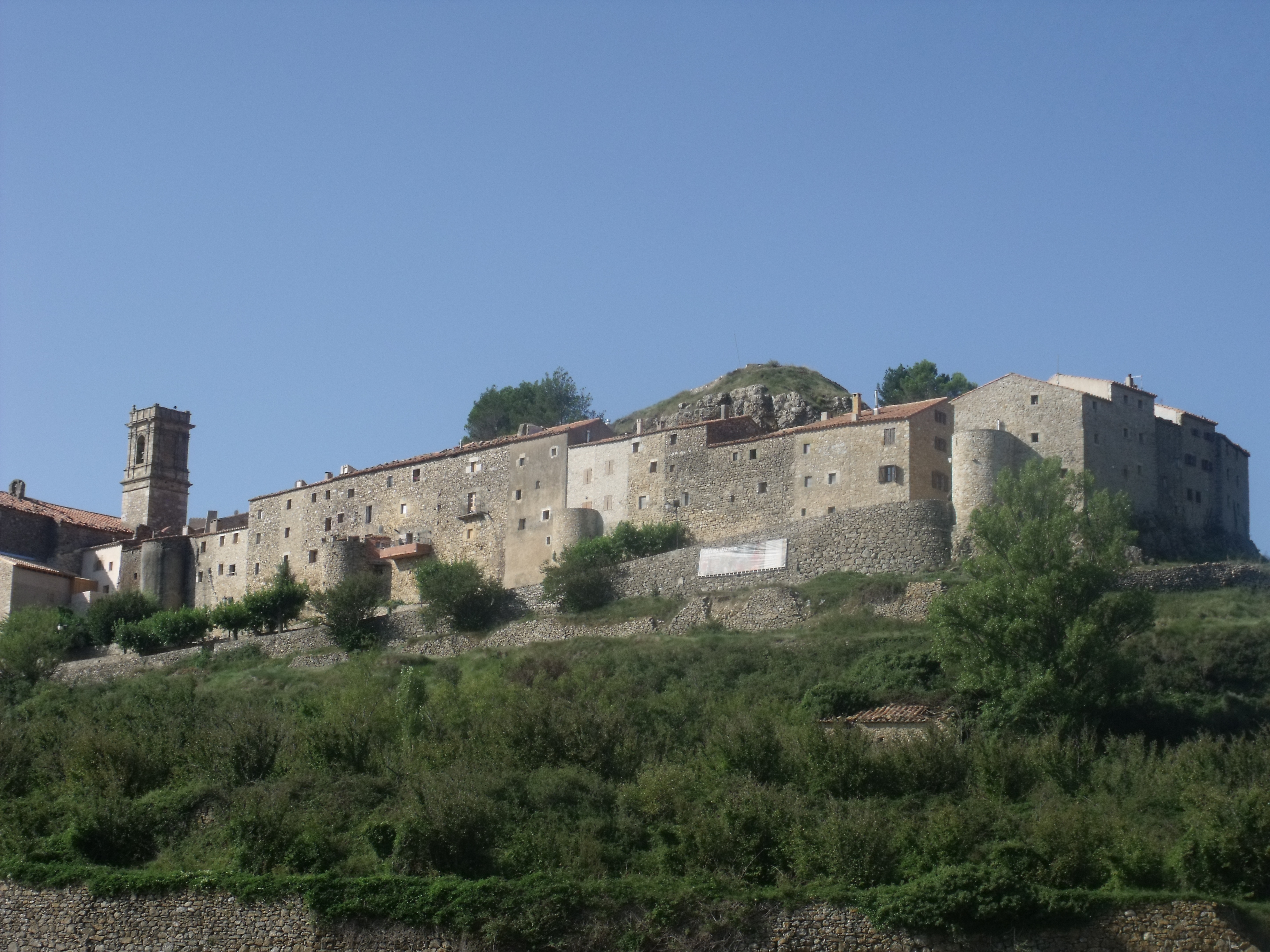 Vista desde la ermita de San Roque